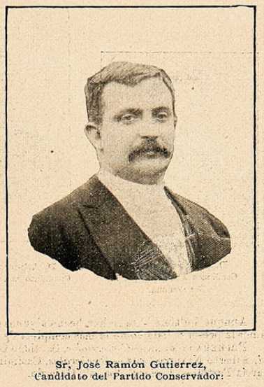 Periodista y político chileno. Fue alcalde de Valparaíso en 1900